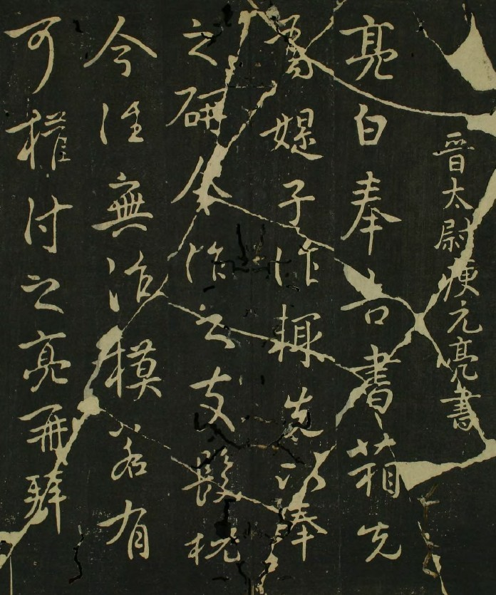 中文（中国大陆）: 宋淳化三年（992年），太宗赵炅令出内府所藏历代墨迹，命翰林侍书王著编次摹勒上石于禁内，名《淳化阁帖》。